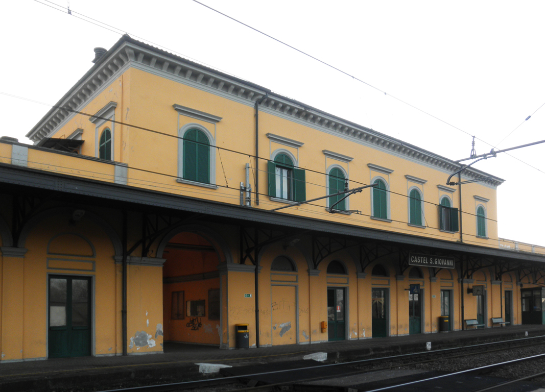 Stazione ferroviaria di Castel San Giovanni.